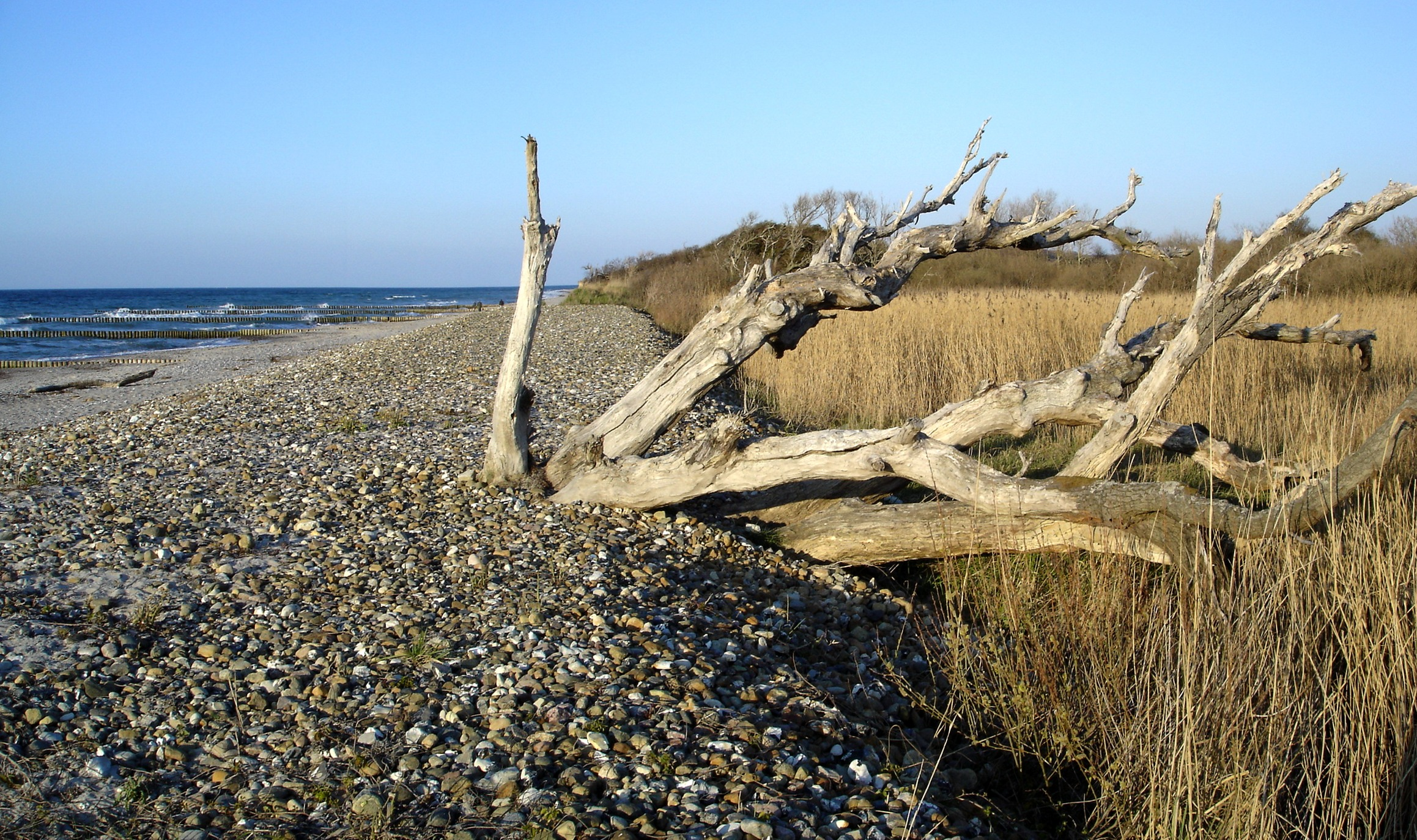 Strand bei Börgerende, Landschaftsschutzgebiet „Kühlung“